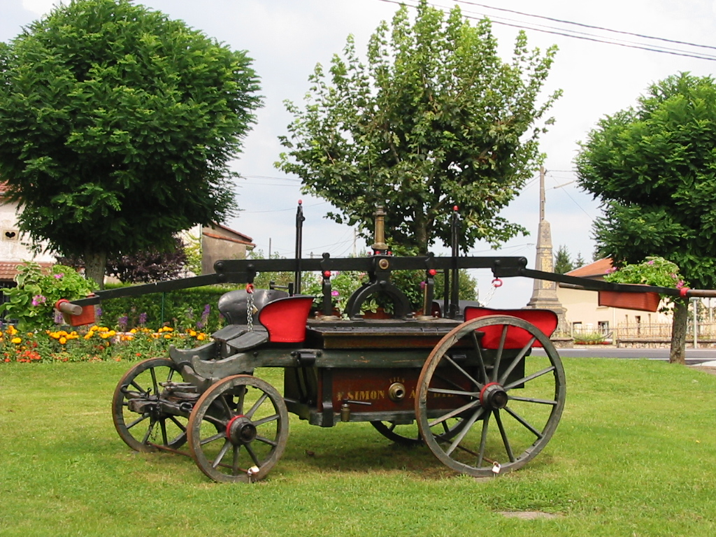 Place du Point du Jour à Chenevières (Meurthe-et-Moselle) : Pompe à bras